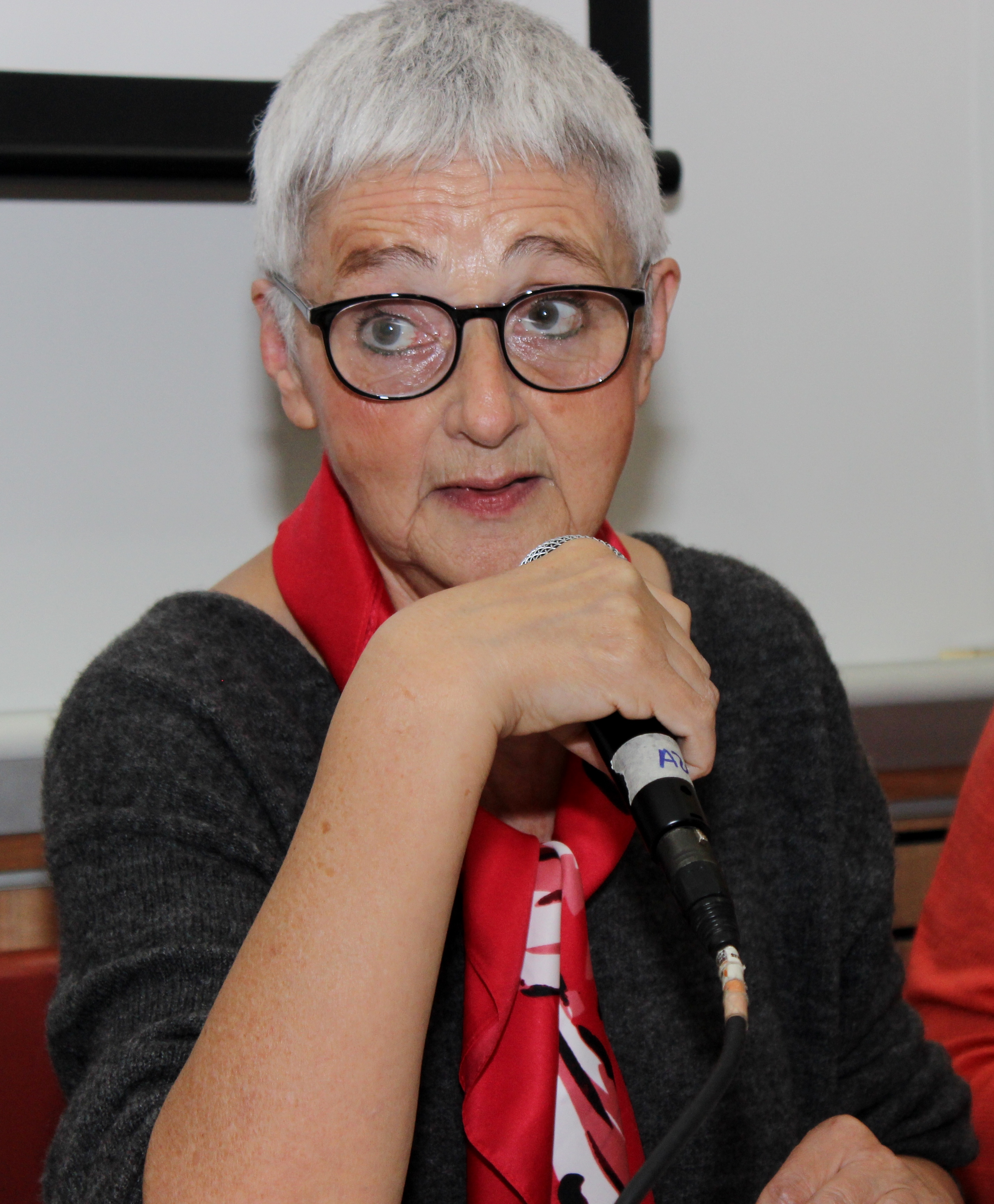 La escritora chilena Ana María del Río en la Casa Central de la Pontificia Universidad Católica de Chile durante la primera etapa del Festival de Autores de Santiago 2018.